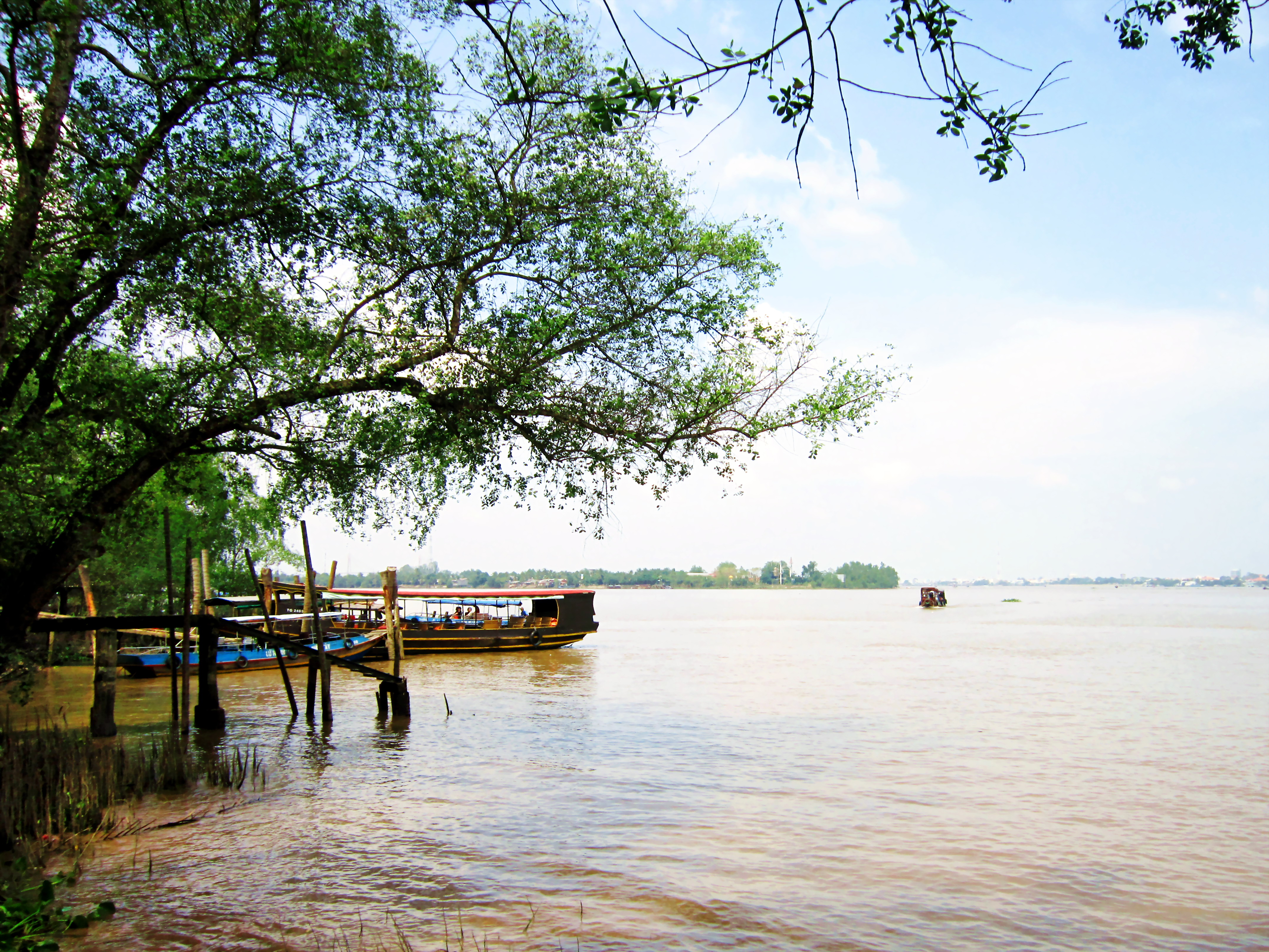 Tàu du lịch cặp bến cồn Phụng trên sông Tiền, thuộc tỉnh Bến Tre, Việt Nam.